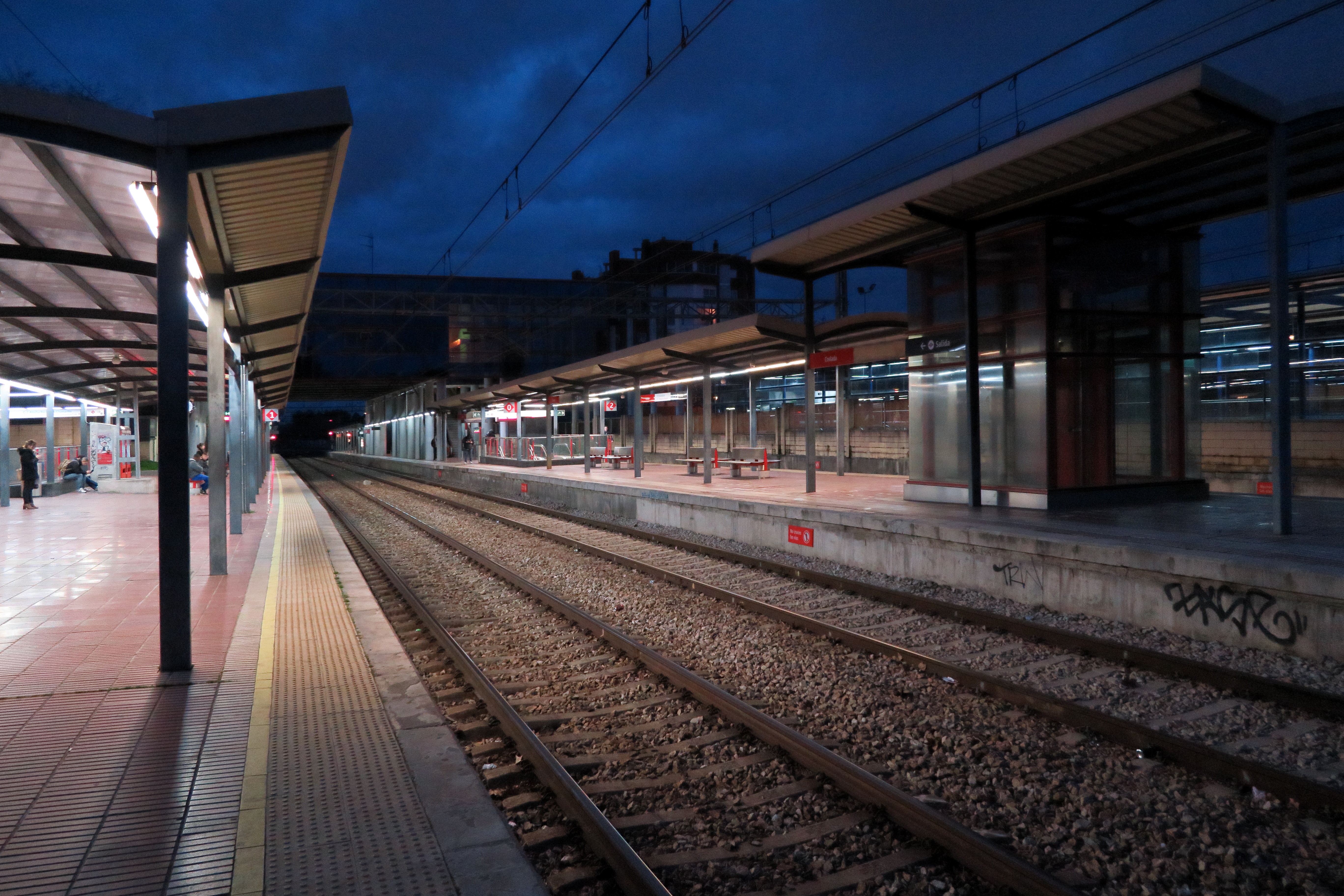 Estación de Coslada